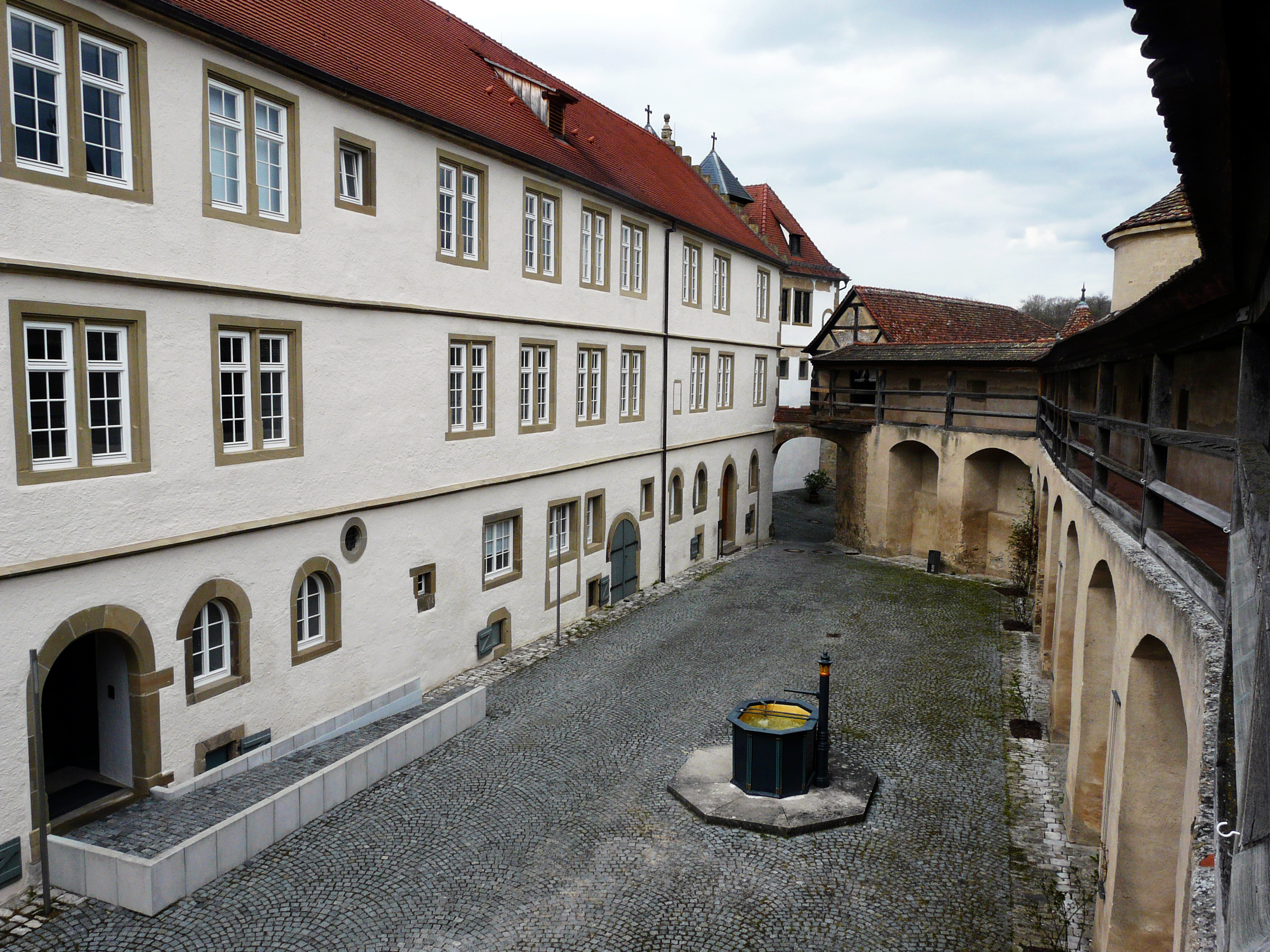 Монастырский двор